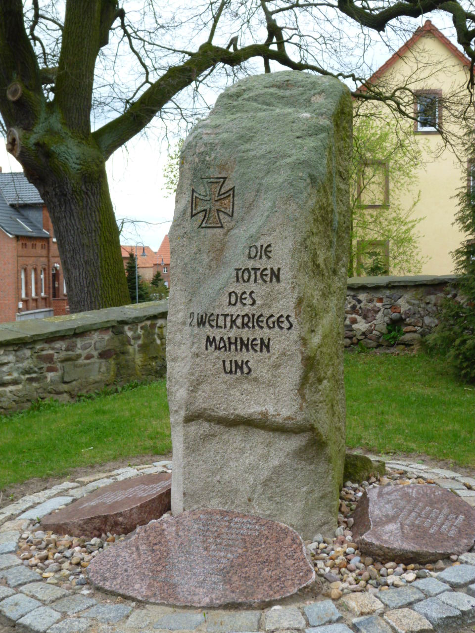 Calvörde-Wegenstedt, Kriegerdenkmal für die gefallenen des 2. Weltkriegs, Bild 2